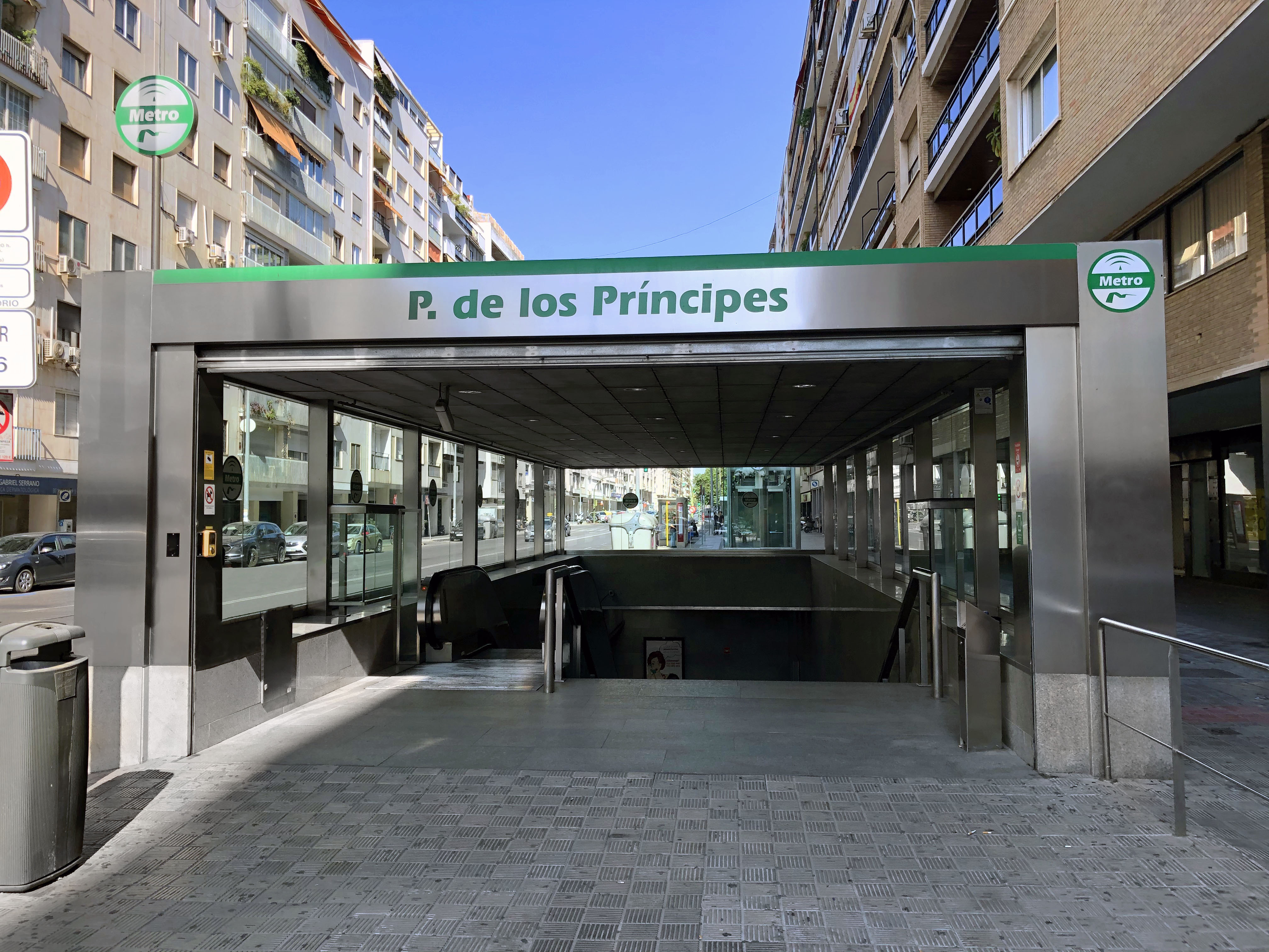 Estación Parque de los Príncipes del Metro de Sevilla